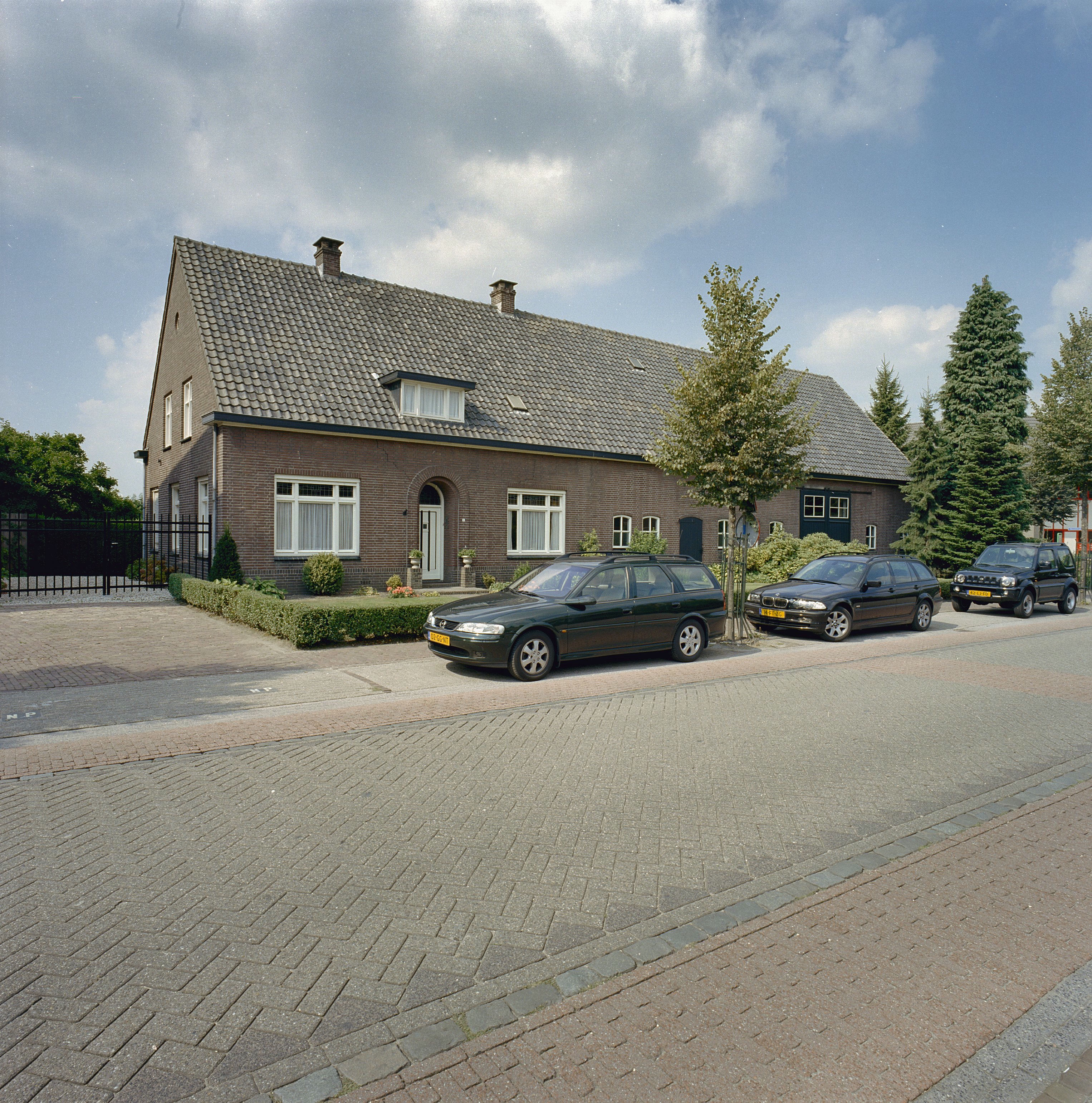 Overzicht voorgevel en linker zijgevel